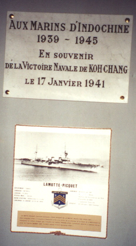 Own work/Photo personnelle. Je suis l'auteur de cette photo, prise dans la Salle du Souvenir au Fort-Musée Montbarrey, à Brest, lors de la cérémonie officielle commémorant le 60e anniversaire de la bataille navale de Koh Chang, le 17 janvier 2001. Utilisateur Svevo